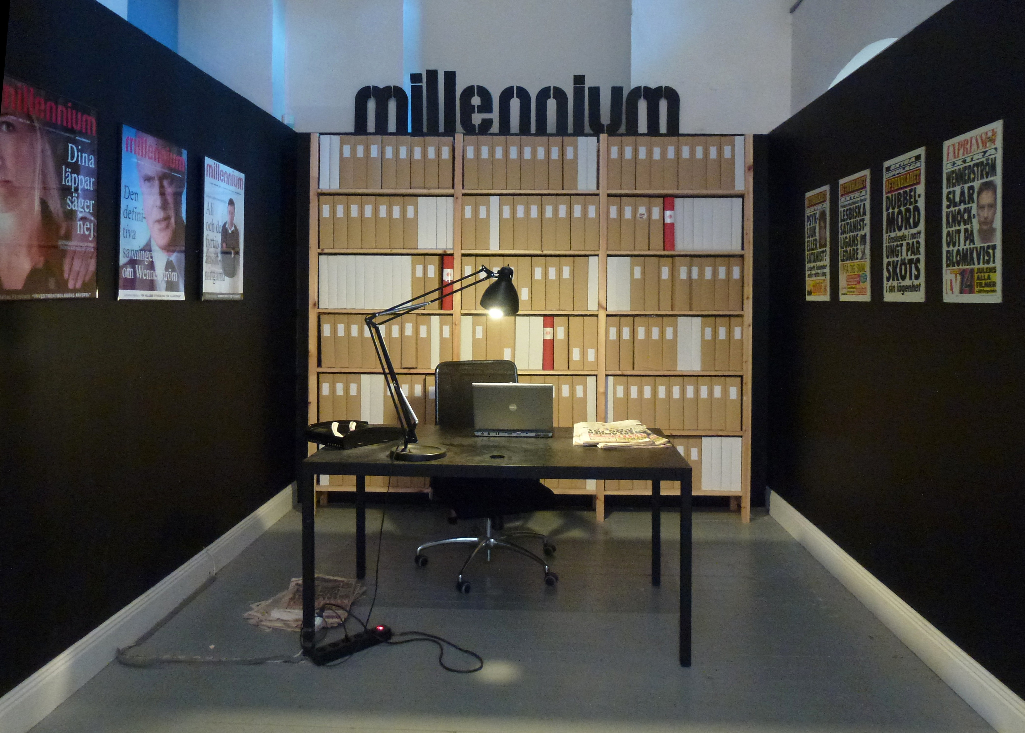 Millenniumutställning på Stockholms stadsmuseum